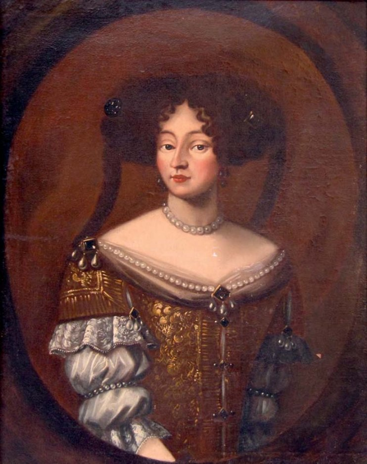 Ritratto di Anna Isabella Gonzaga di Guastalla (1655-1703)